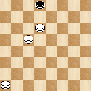 7-й ход дамок в треугольнике Петрова